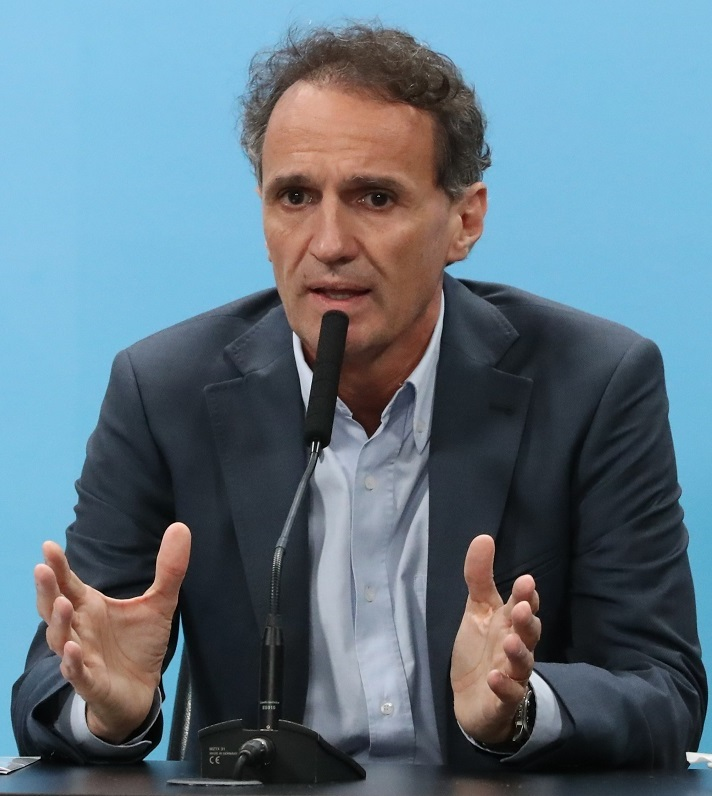 Ministro de Obras Públicas Gabriel Katopodis durante una conferencia de prensa el 18 de marzo de 2020.